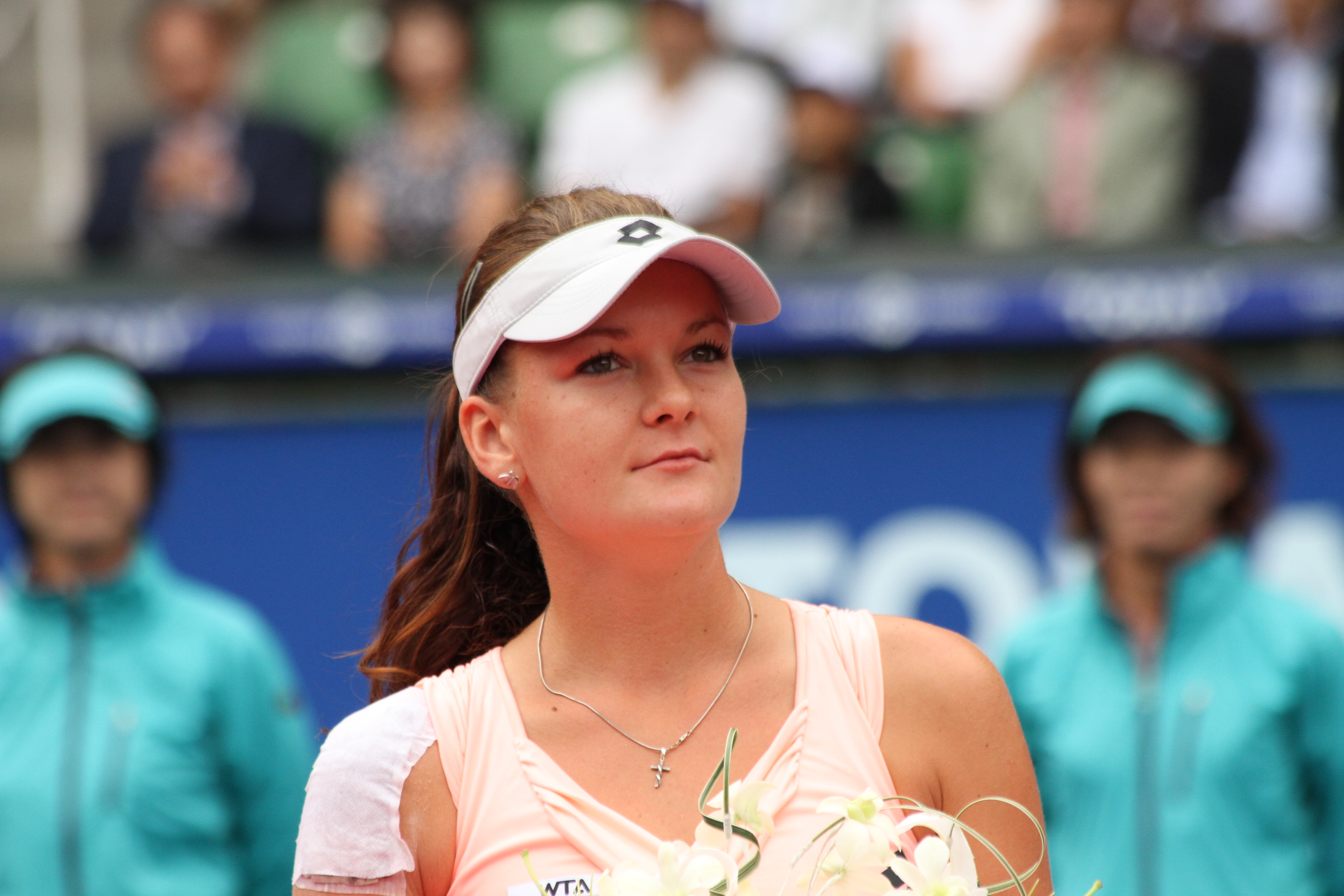 Agnieszka Radwańska at 2011 Pan Pacific Open